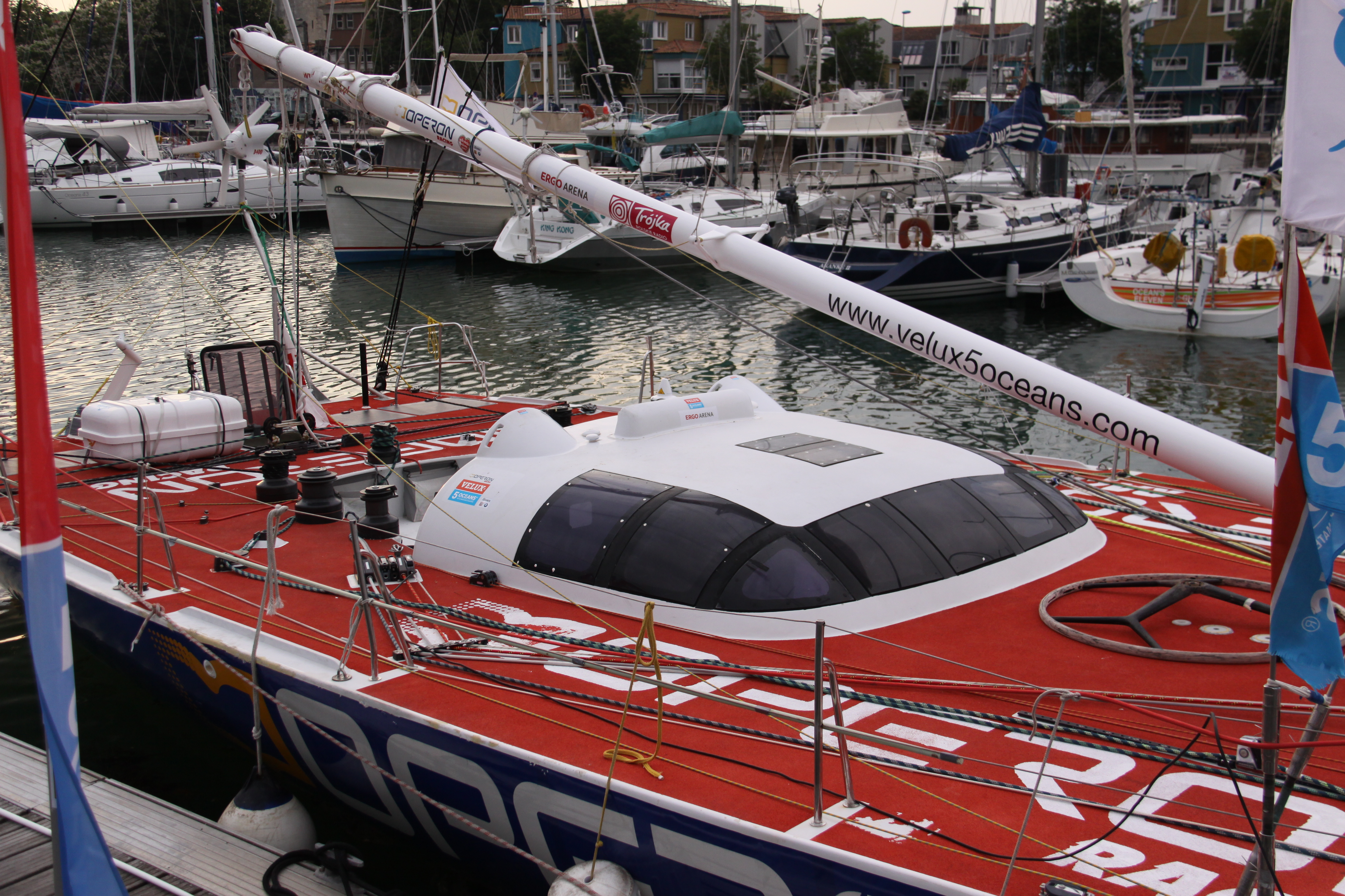 Le voilier de course "Operon Racing" dans le Bassin des Chalutiers à La Rochelle après avoir terminé la course autour du monde en monocoque et en solitaire Velux 5 Oceans 2010-2011 (La Rochelle - La Rochelle). "Operon Racing" est un des premiers voiliers de course Open 60 de troisième génération à voir été mis aux normes de la classe Eco 60 créée pour la Velux 5 Oceans 2010 -2011. "Operon Racing" a été construit en 1991. Il mesure 60 pieds (18,28 mètres) de long et 5,80 mètres de large. Il a changé 11 fois de nom! Ancien "Bagages Superior". Skipper: Zbigniew Gutkowski, Pologne, Second de la Velux 5 Oceans 2010 - 2011. La Rochelle, Charente Maritime, France.